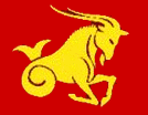 arouez roman